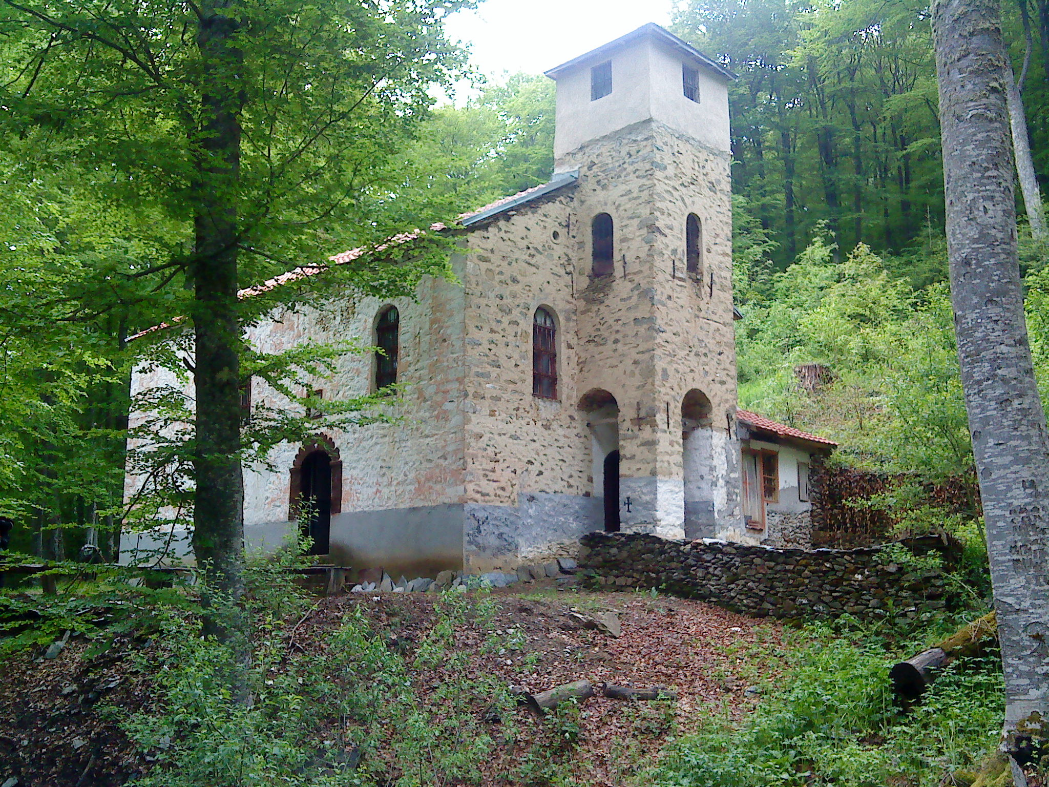 Црква св.Ана на 1400 н.в југозападно од село Маловиште